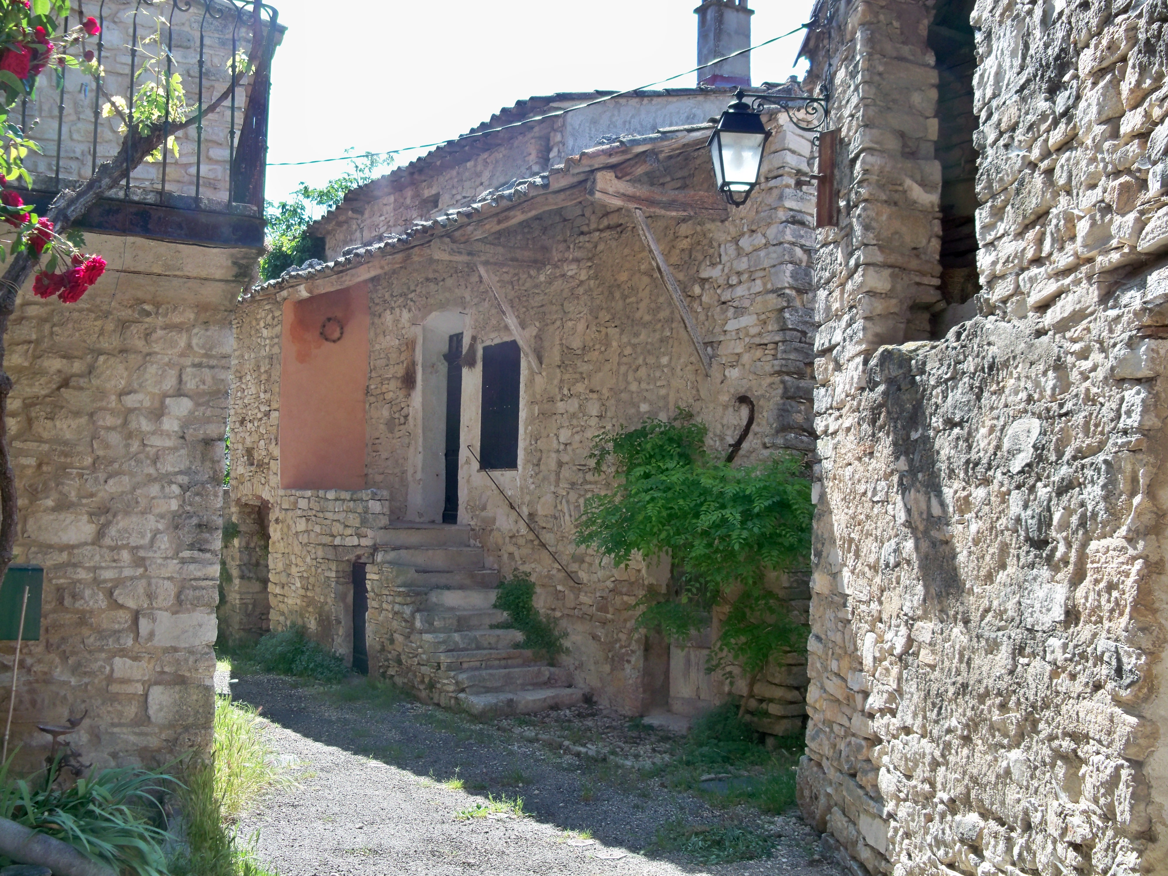 Maison en hauteur au Boiset (Saint Martin de Castillon), Vaucluse, France